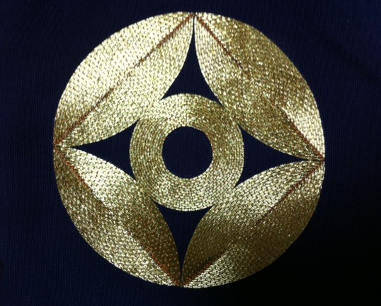 七宝に蛇の目